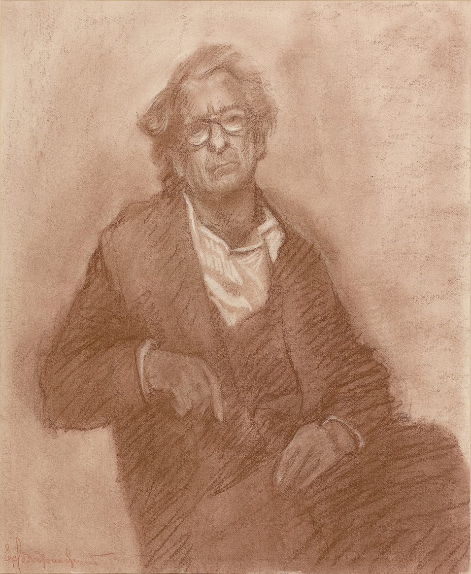 דיוקן עצמי. צויר בירושלים